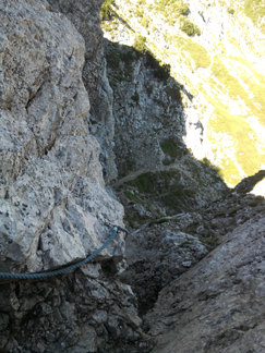 Seilgesichertes Stück am Gipfelweg der Gaichtspitze